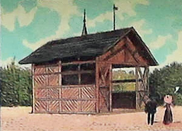 Borkenhäuschen auf dem späteren Standort das Kaiser-Wilhelm-Turms